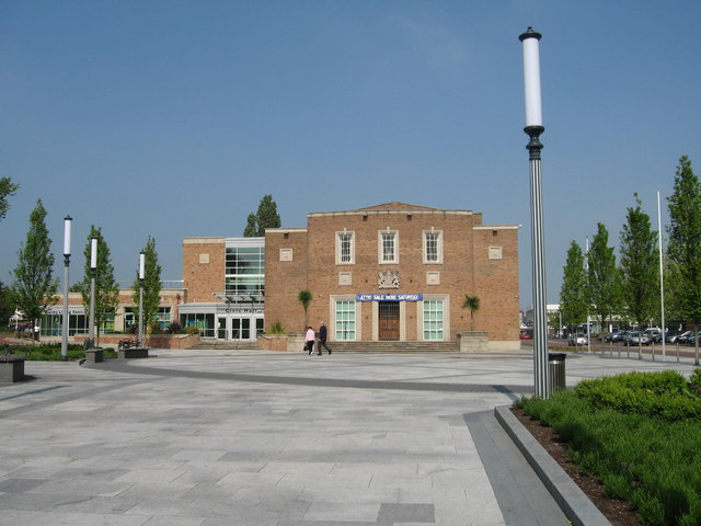 Civic Hall, Ellesmere Port